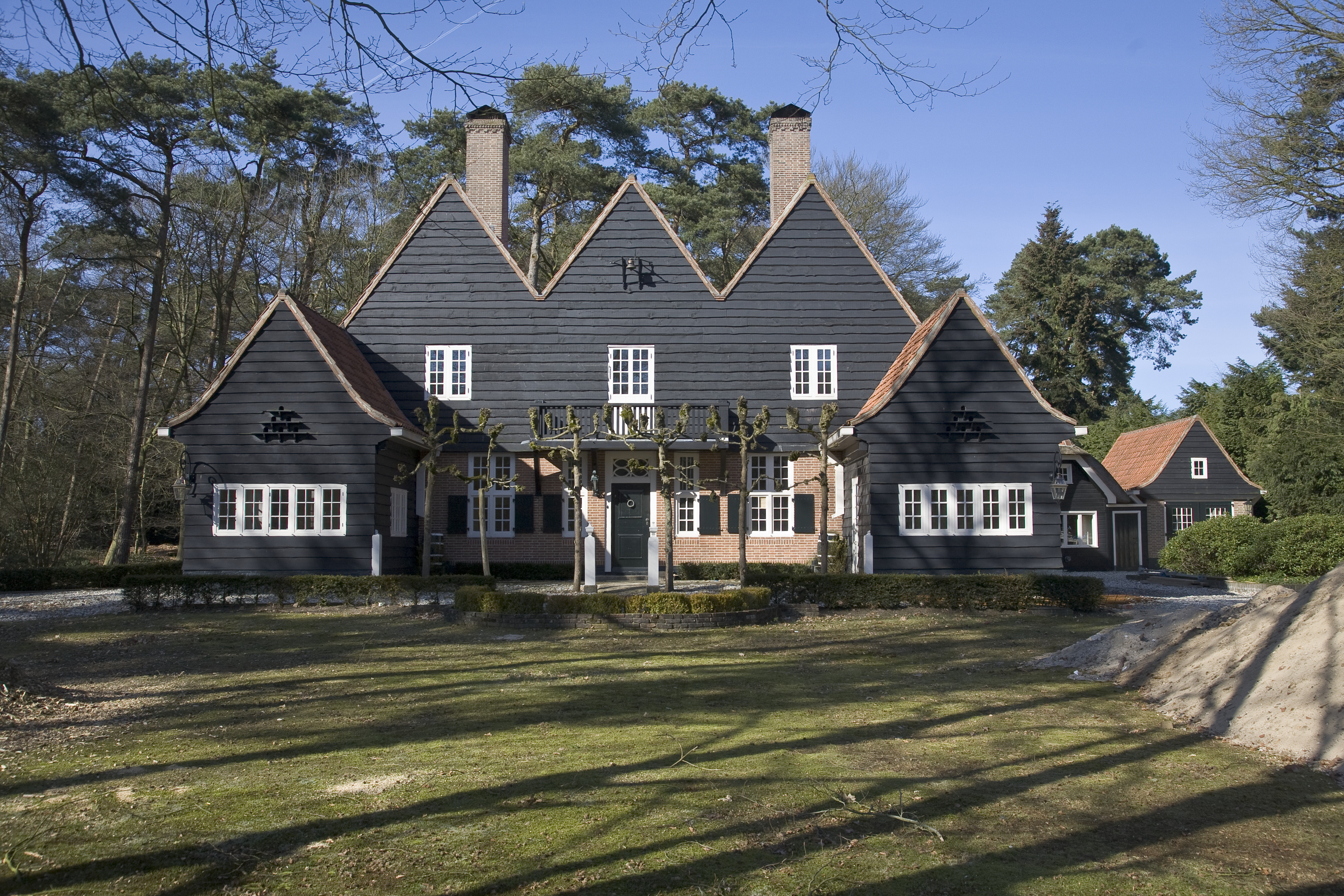 Lovdalla: Overzicht voorgevel (opmerking: Gefotografeerd voor Wegh der Weegen, ontwikkeling van de Amersfoortseweg 1647-2010)